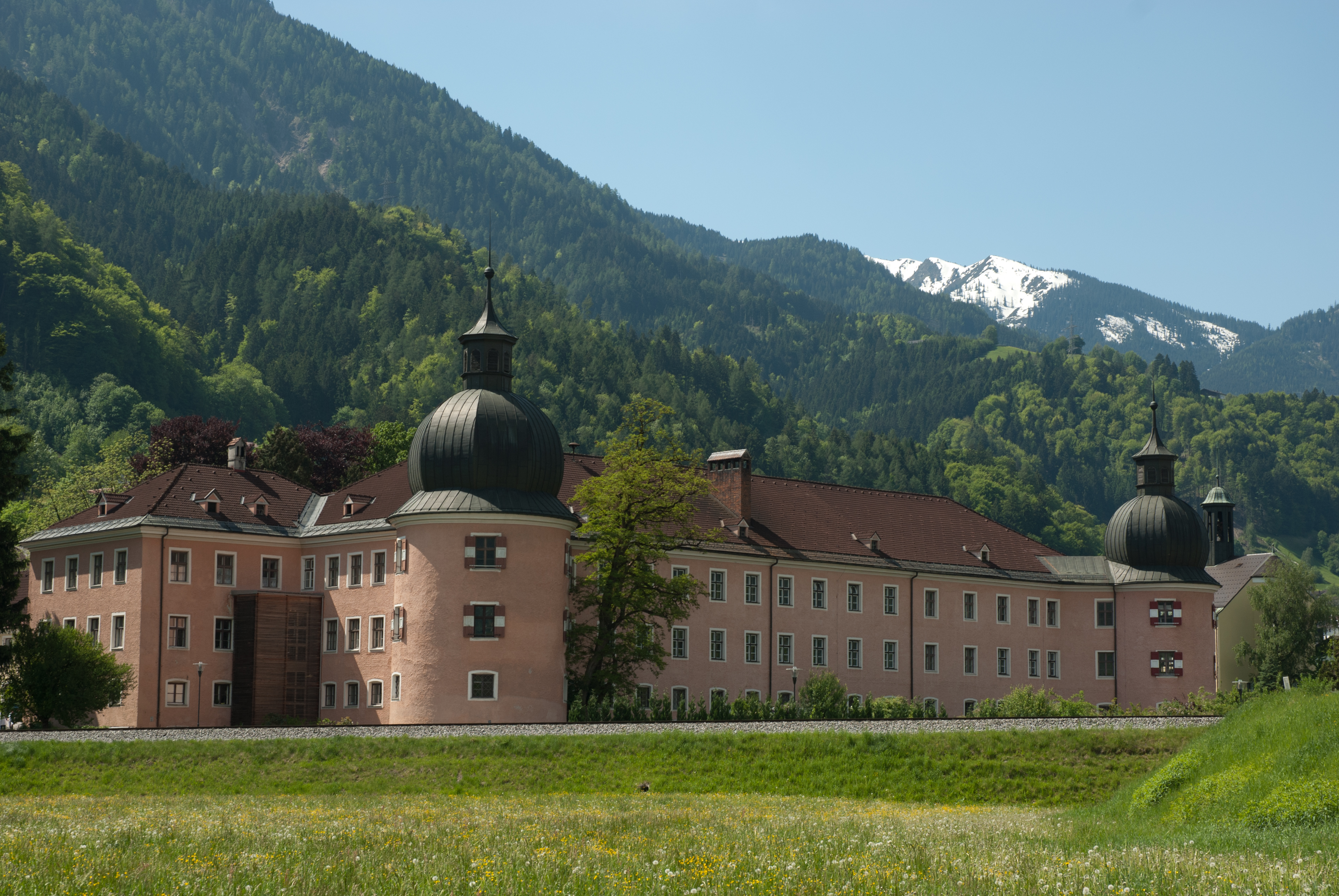 Landwirtschaftliche Lehranstalt Rotholz